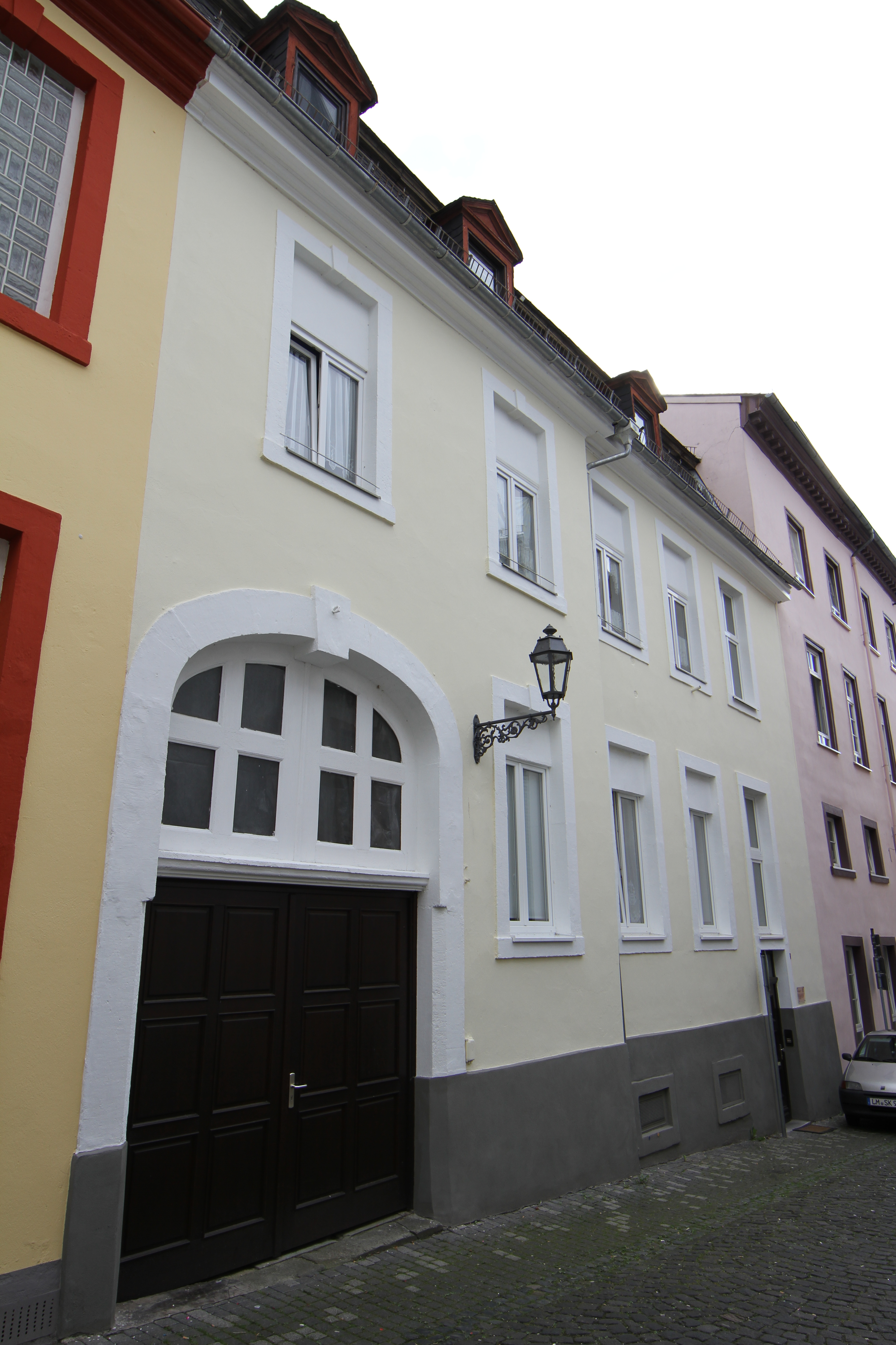 Errichtet 1784 als Husarenkaserne (Gendarmerie des Amtes) durch den Weilburger Bauinspektor Johann L. Leidner (* 26.08.1756 Braunfels, † 11.02.1828, Weilburg). Eine der ersten von Leidner in Weilburg geleiteten Baumaßnahmen war die Fortführung des Gymnasiumbaus, den er unter Änderungen und Erweiterungen der ursprünglichen Pläne seines Vorgängers Gunkel, fertigstellte. Weitere unter seiner Regie entstandene Bauten sind u. a. diese Husarenkaserne (1783/1786), die Kirche in Kubach (1784), die Kettenbrücke (1785/86), das Posthaus (1786) die erneuerten Brückenhäuser mit Flutgraben (1787/1788) und die Häuser Pfarrgasse 1 (1790) und Pfarrgasse 3 (1788). Bereits 20 Jahre später, ab 1803 in der Napoleonischen Zeit, wurde diese Liegenschaft für die Amts- und Ren­teiverwaltung umgebaut, zeitgleich erfolgte der Umbau des Stalles im Hof (siehe Mauerstraße 13). 1843 er­warb die jüdische Gemeinde den größe­ren Hausteil Nr. 2 und richtete hier ihre Synagoge ein. Von den Zerstörungen der sog. Reichskristallnacht blieb die Synagoge verschont, weil das Gebäude zuvor an Private veräußert worden war. Zweistöckiger, verputzter Bruchstein­bau mit Werksteingewänden und einem doppeltraufigen Mansardwalmdach. Er­richtet im Stil eines schlichten Straßen­palais. Von neun Achsen der Hauptfas­sade treten die drei mittleren in einem flachen, kaum merklichen Risalit her­vor. Hier auch ein Korbbogenportal und Verwendung von Keilsteinen. Asymme­trisch verändert ist die Anordnung der Haustüren. Dieses Foto entstand im Rahmen des Projekts Wiki Loves Monuments Mittelhessen, das aus dem Community-Projektbudget von Wikimedia Deutschland e. V. gefördert wurde.